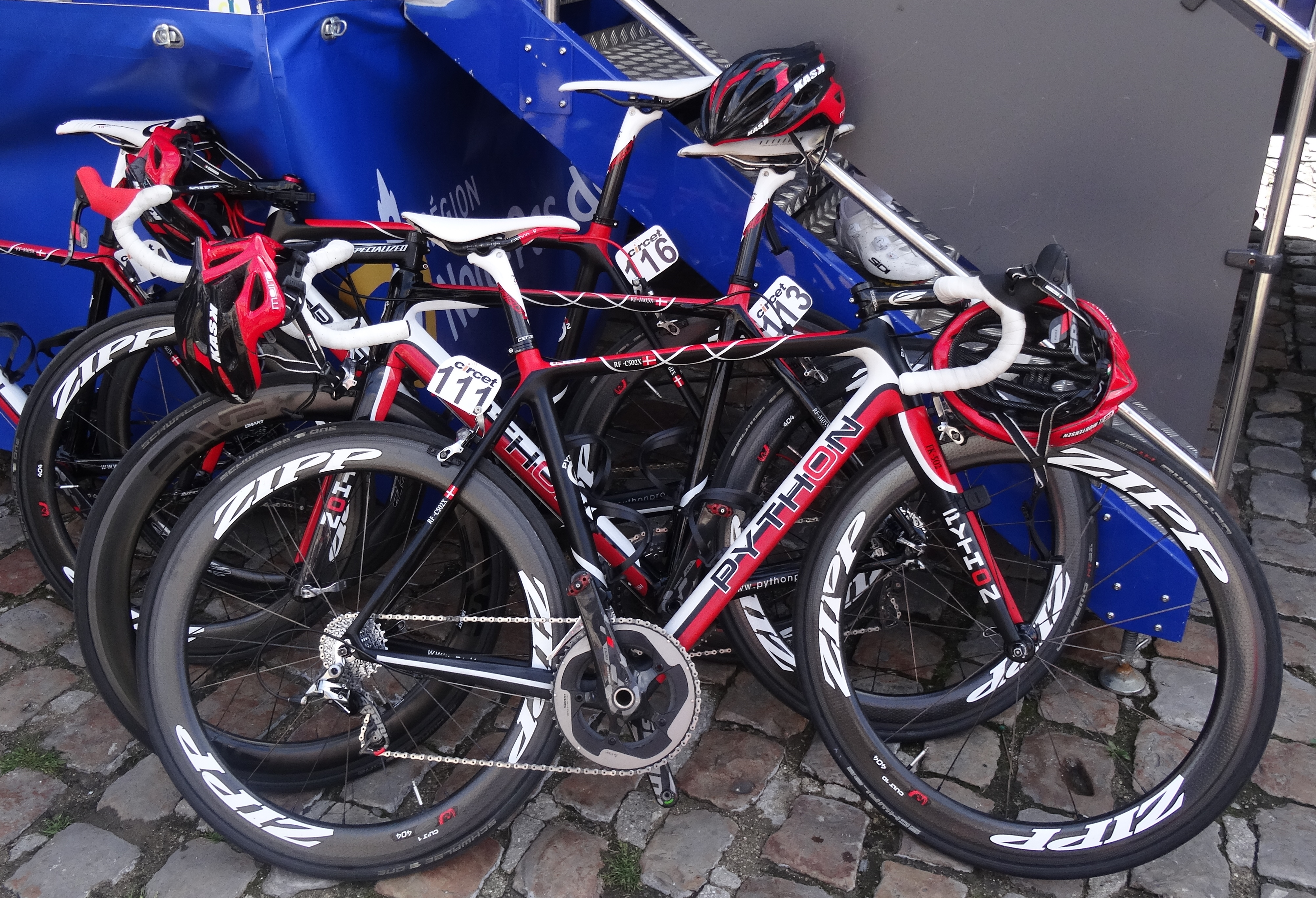 Reportage photographique réalisé le dimanche 25 mai 2014 à l'occasion du départ et de l'arrivée de la troisième étape du Paris-Arras Tour 2014 à Arras, Pas-de-Calais, Nord-Pas-de-Calais, France. Depicted team: Cult Energy Vital Water